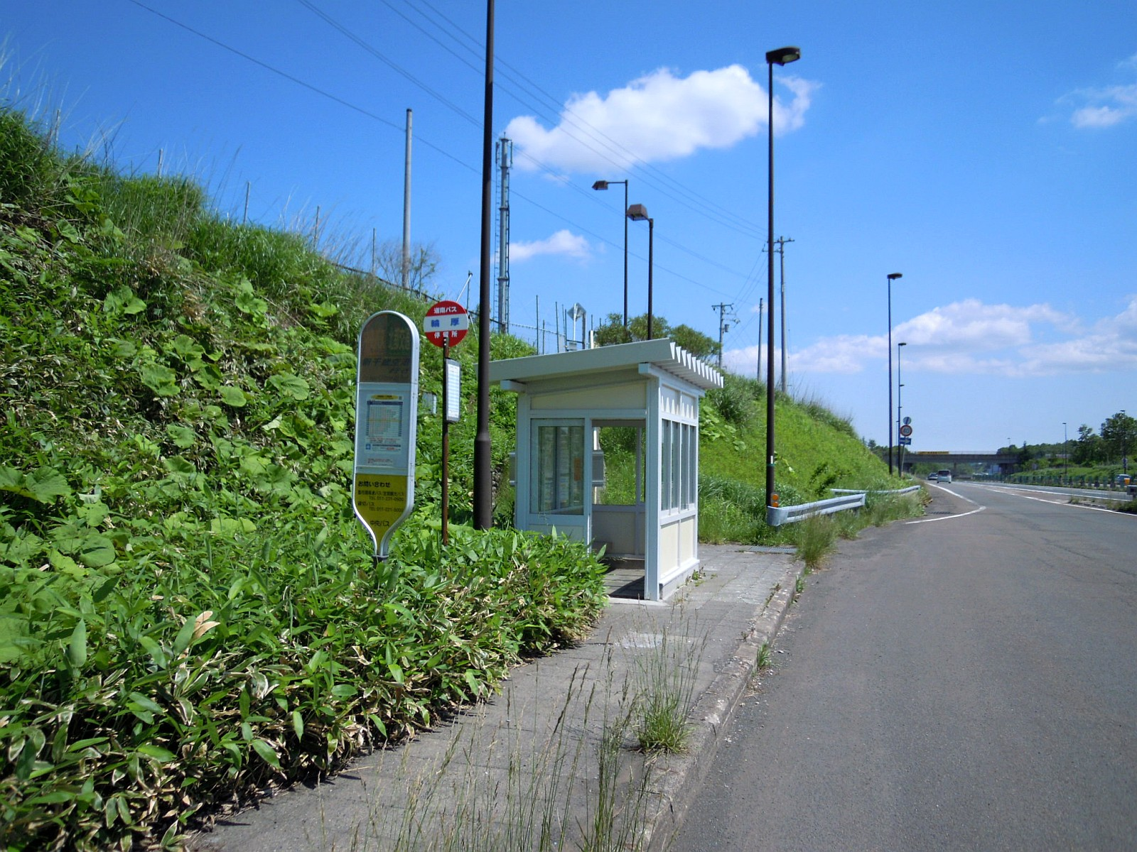 道央自動車道輪厚パーキングエリア近傍に設置されている輪厚バスストップ（上り線側）